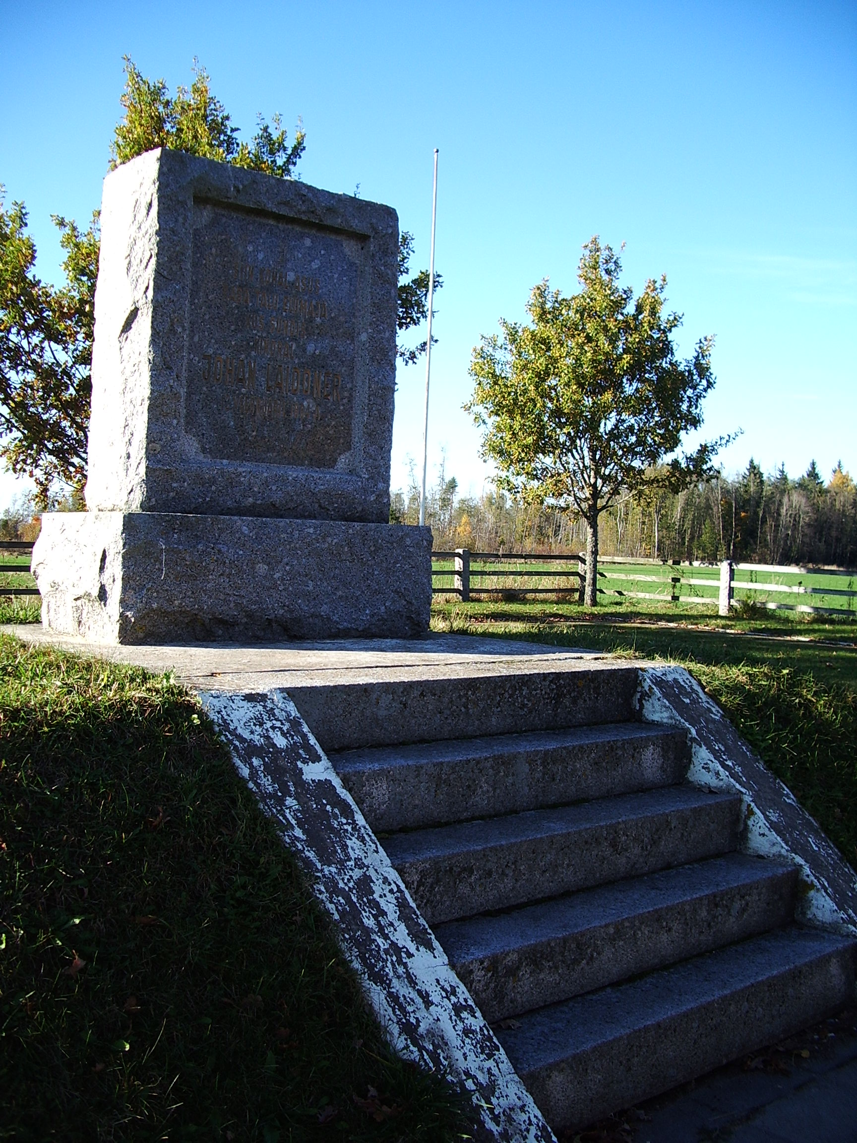 "Siin kohal asus Raba talu elumaja, kus sündis Johan Laidoner 18. veebruaril 1884. A D"